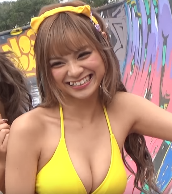 まぁみです。